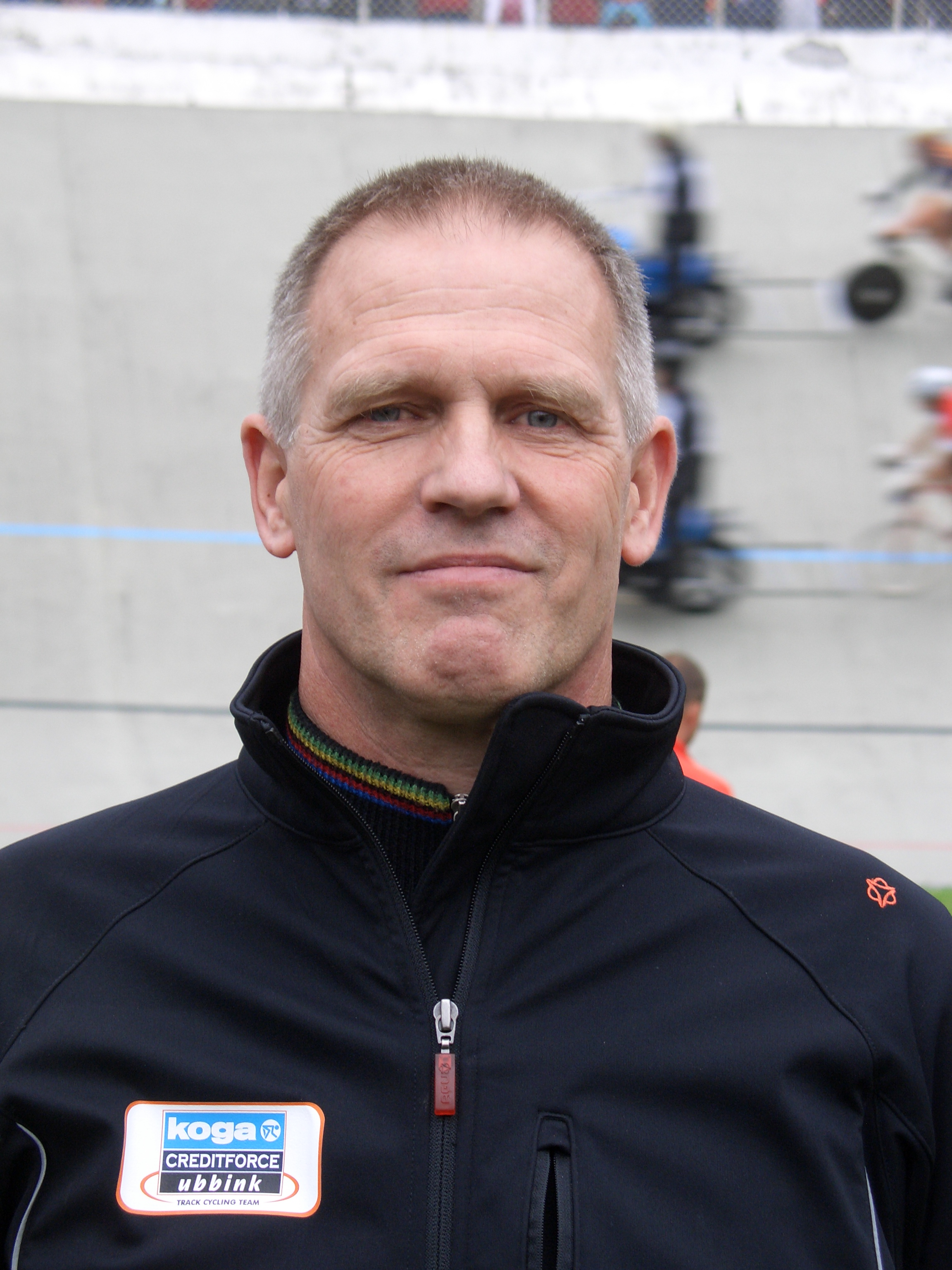 René Kos, ehem. niederländischer Radrennfahrer